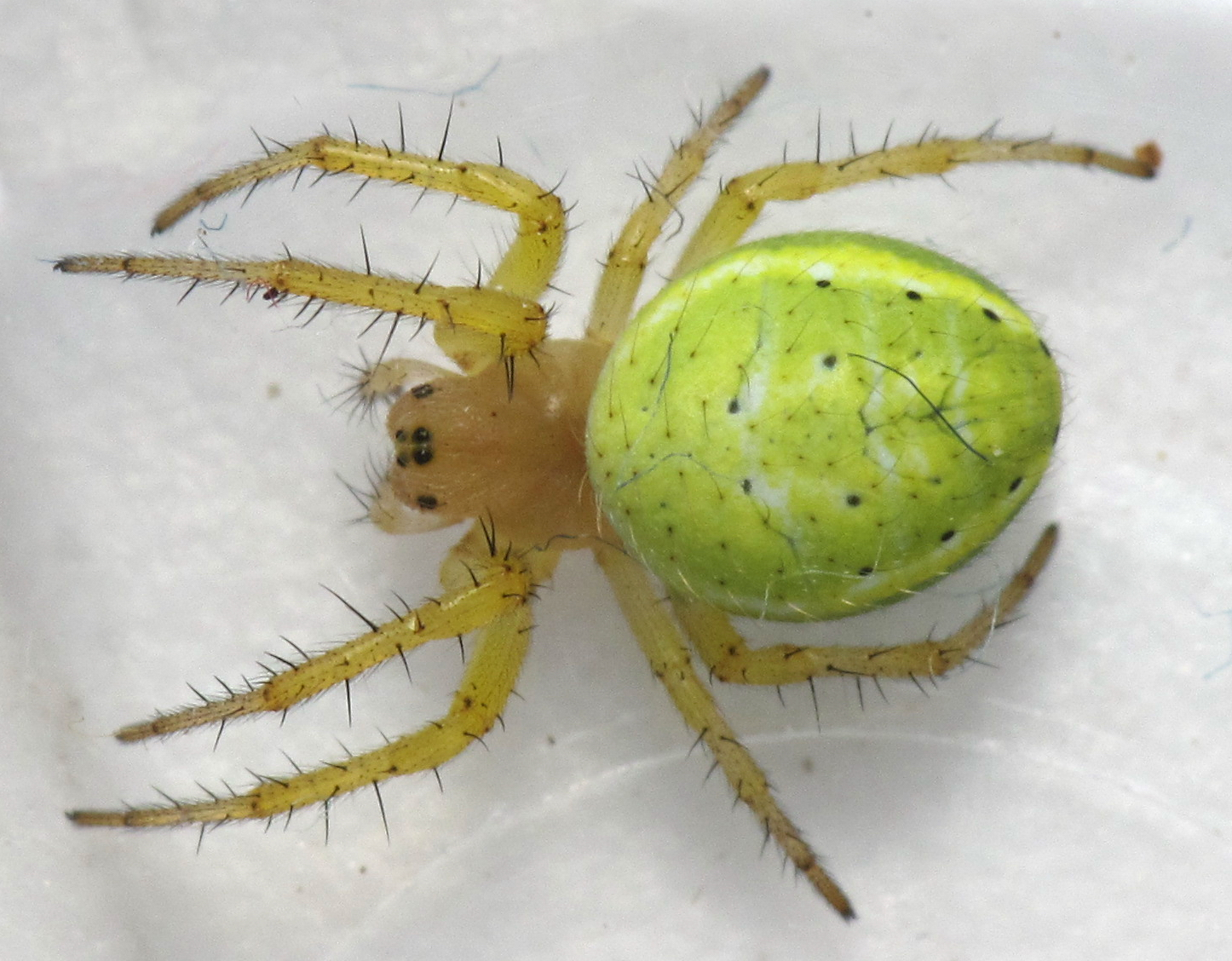 Araña (femia de Araniella cucurbitina) en Bastavales, Brión, Galiza